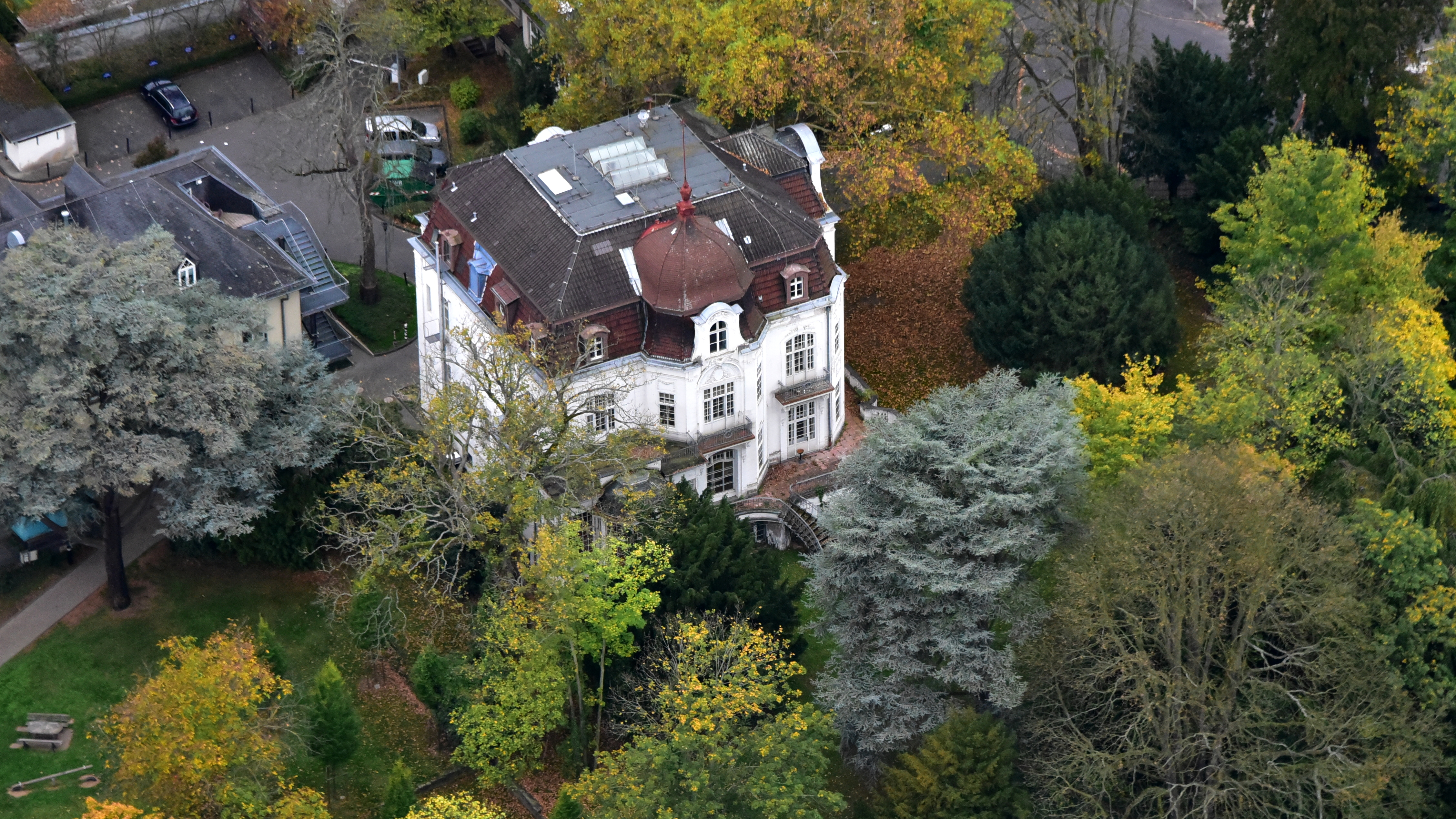 Denkmalgeschützte Villa, Tempelstraße 10, Bonn-Gronau: Luftaufnahme (2017)